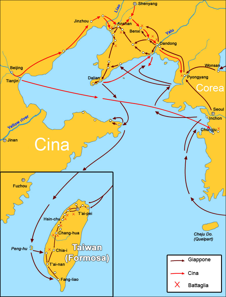 Mappa delle battaglie della prima guerra sino-giapponese (1894-95).